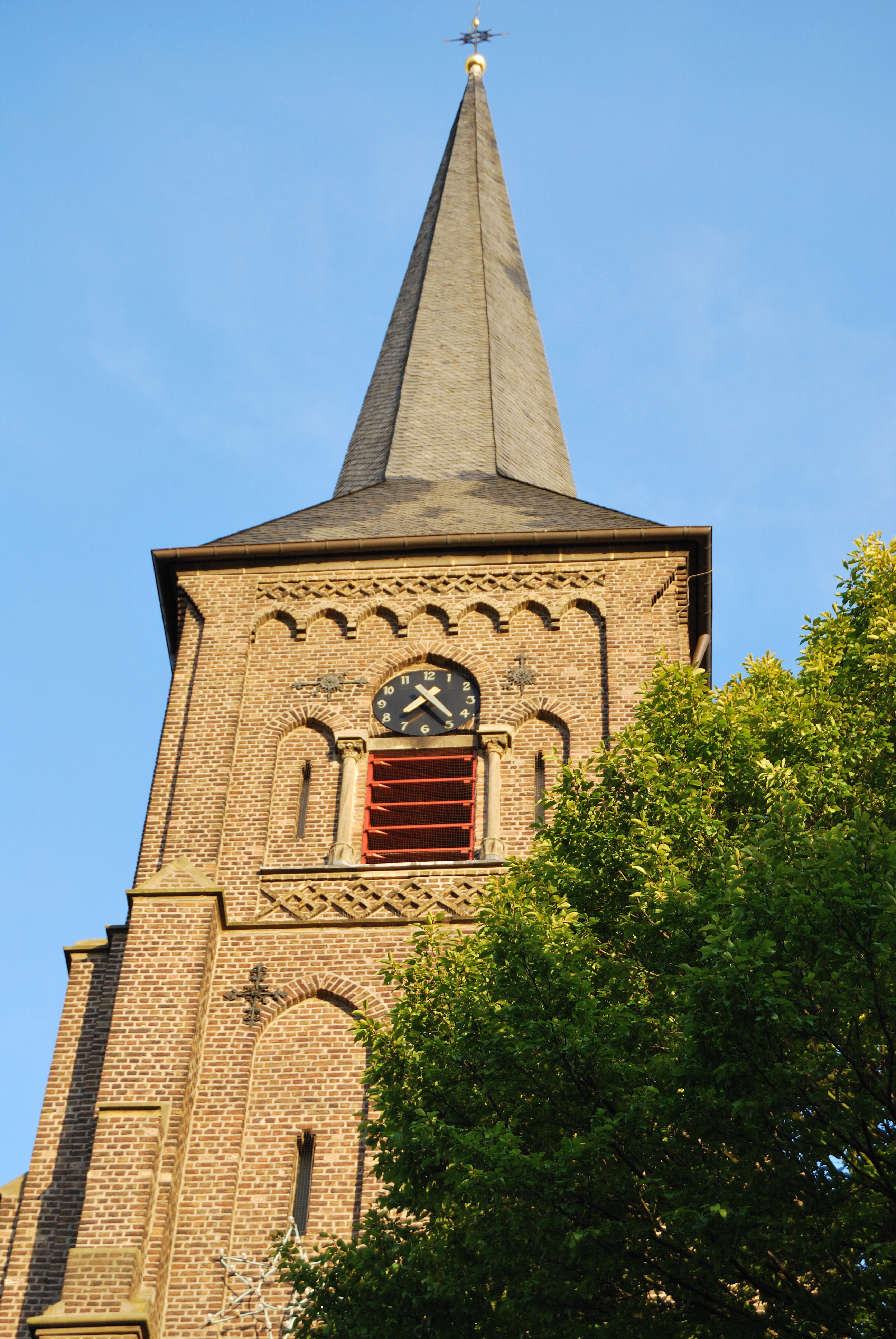 Denkmalnummer 150